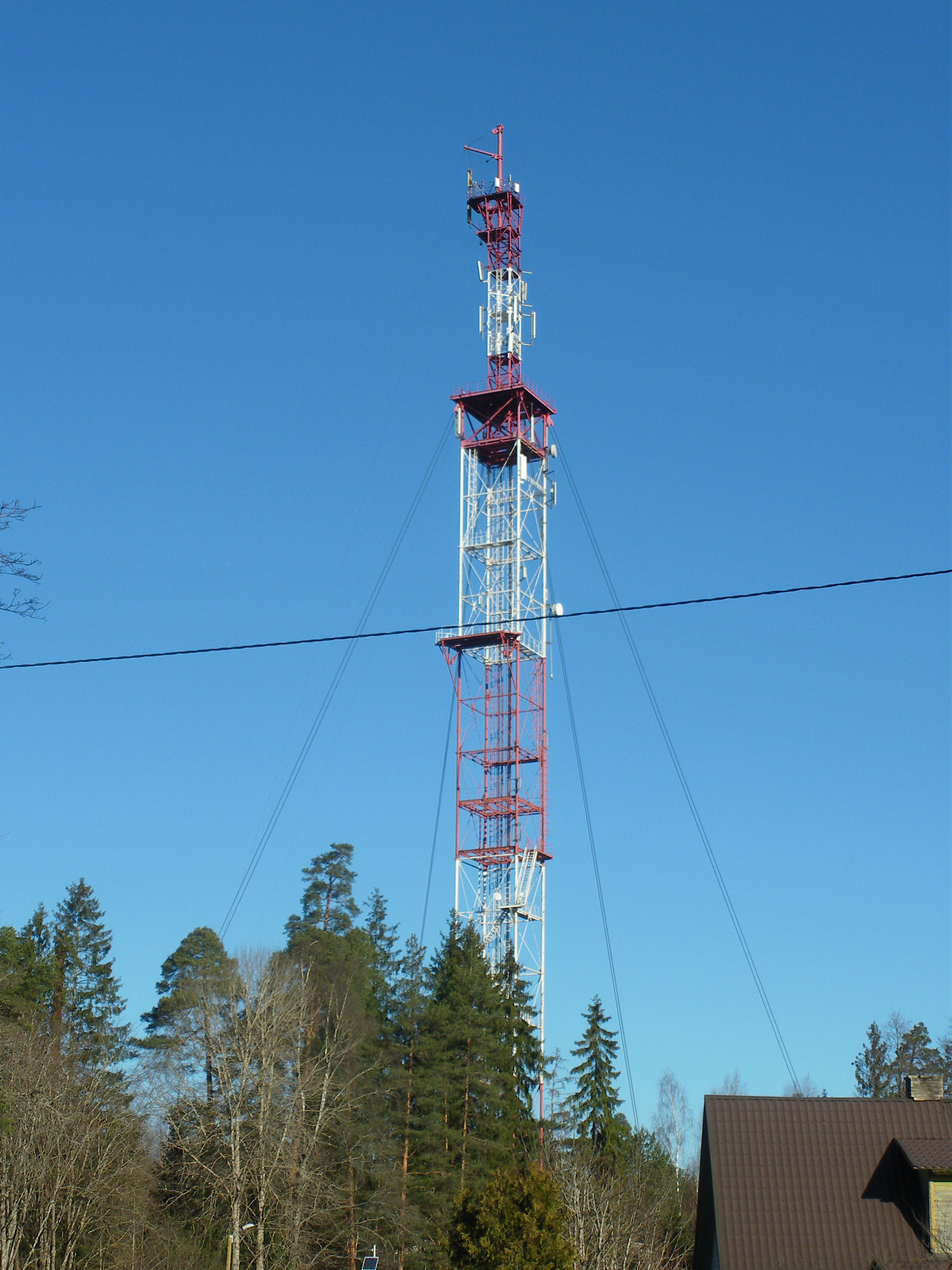 Aegviidu telemast. Aegviidu mast oli tehniline sõlmpunkt, kust kanalid pääsesid edasi Narva, Tartu ja Pärnu suunas. Praegu kuulub mast Elionile.